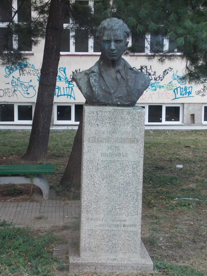 Српски (ћирилица): Bista-Stanimira-Veljkovica-Zele